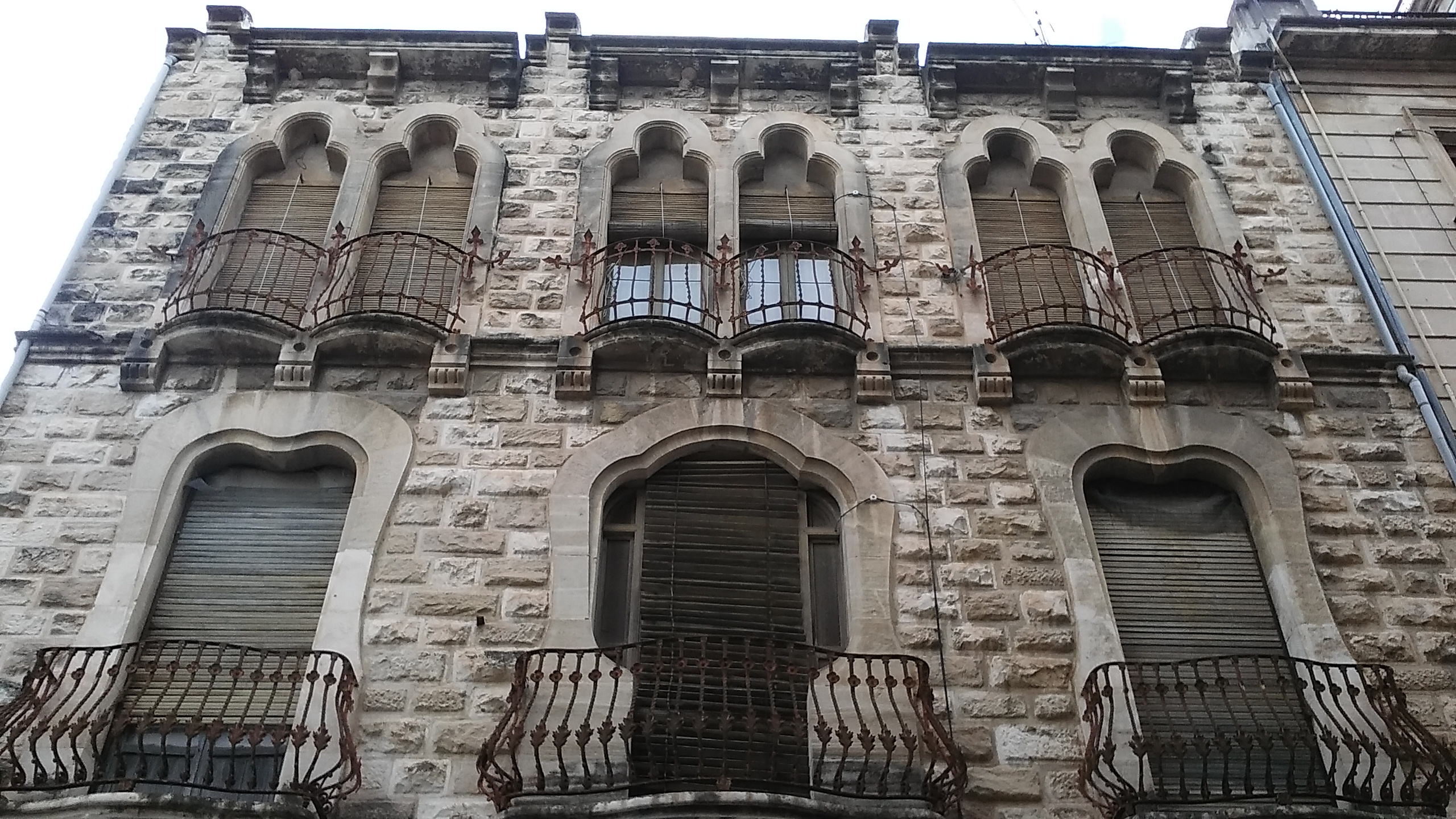 Edifici moderniste Casa Vilaplana, en Alcoy (Alacant).